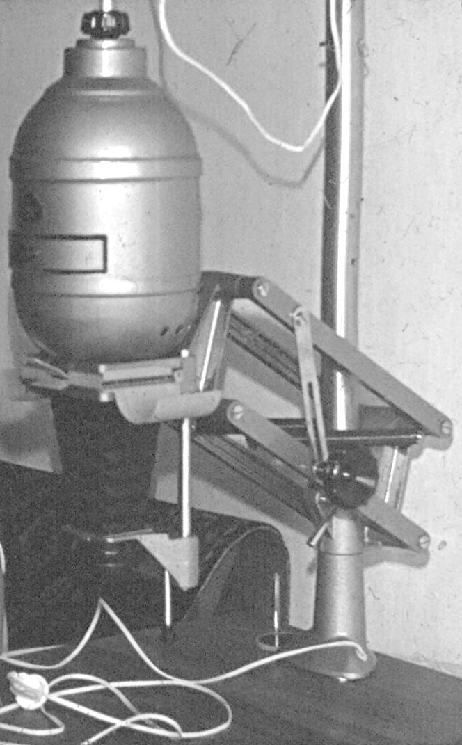 Универсальный (60х90 и 24х36 мм) фотоувеличитель "Нева-4". СССР, 1983 год.